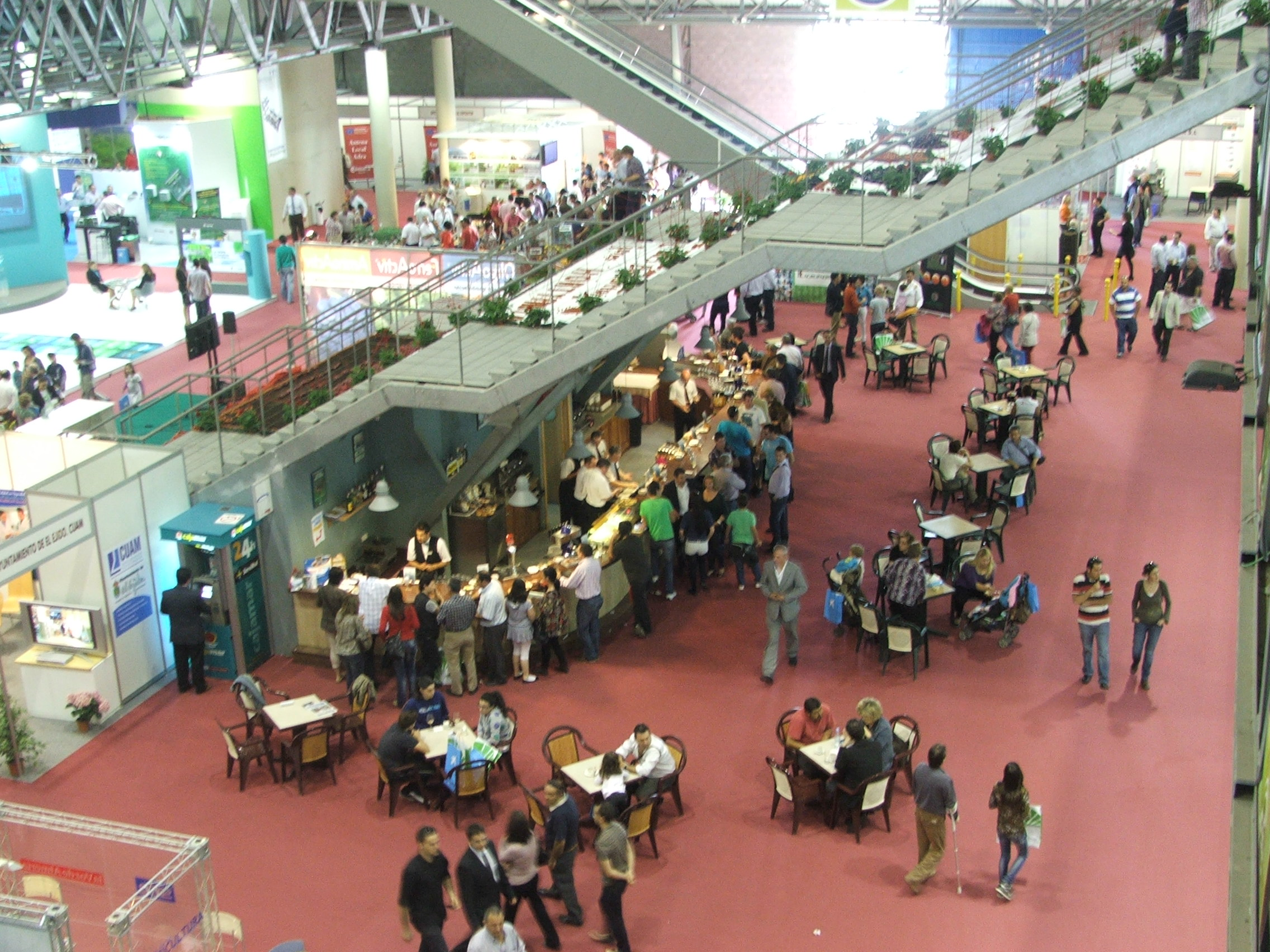 Fotografía de la Expo Agro celebrada en 2011 en Almería, Andalucía, España.